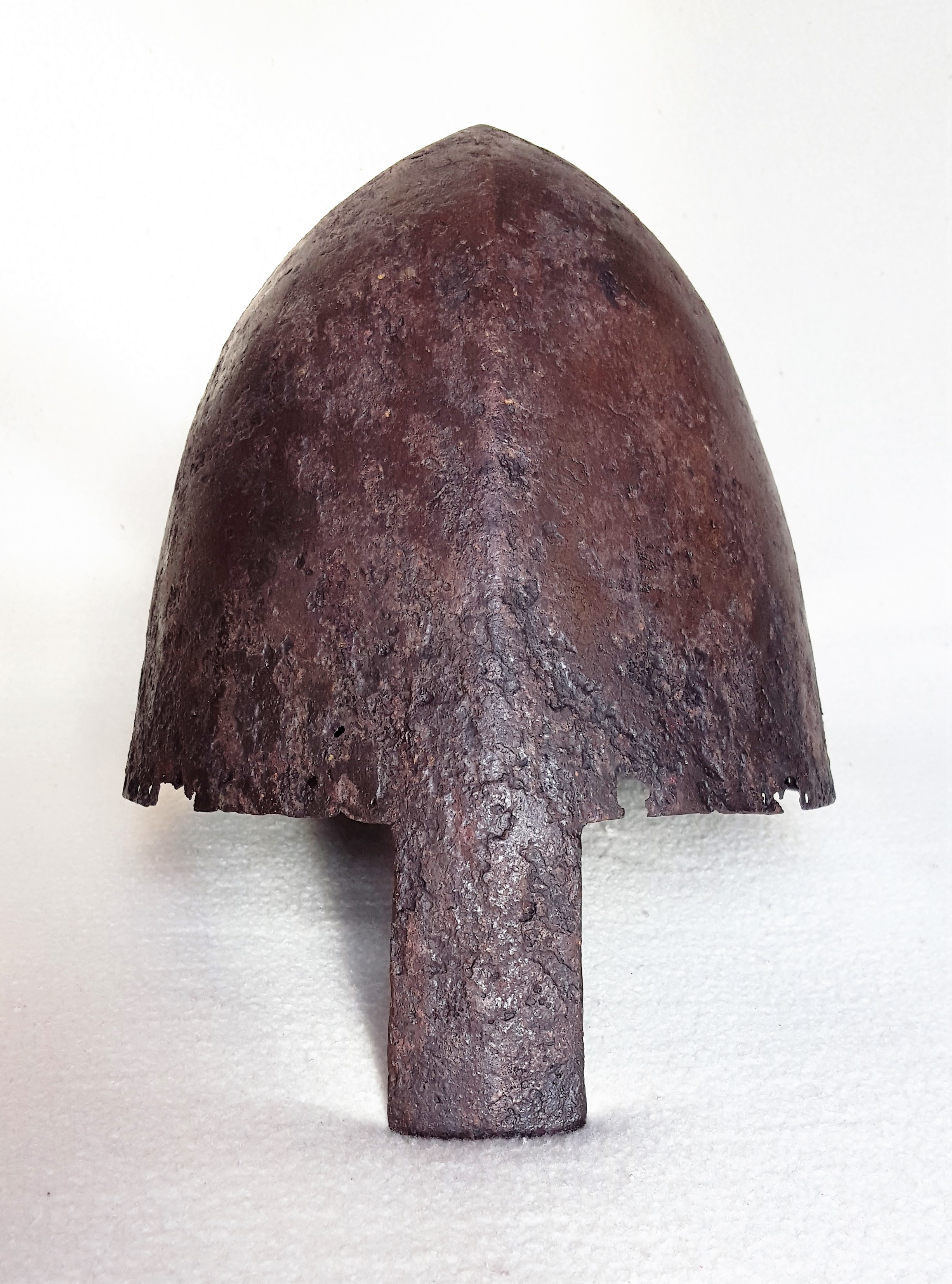 Nasalhelm aus Esztergom, Ungarn.